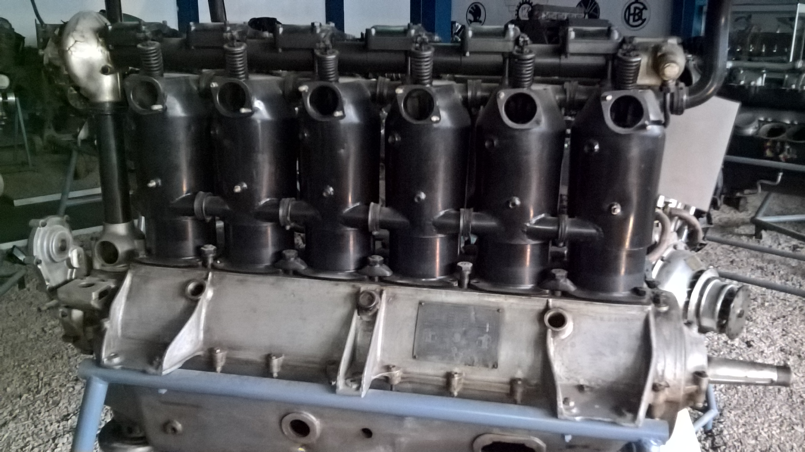 Niemiecki 6-cylindrowy silnik rzędowy z 1918 r. eksponowany w Muzeum Lotnictwa Polskiego w Krakowie.